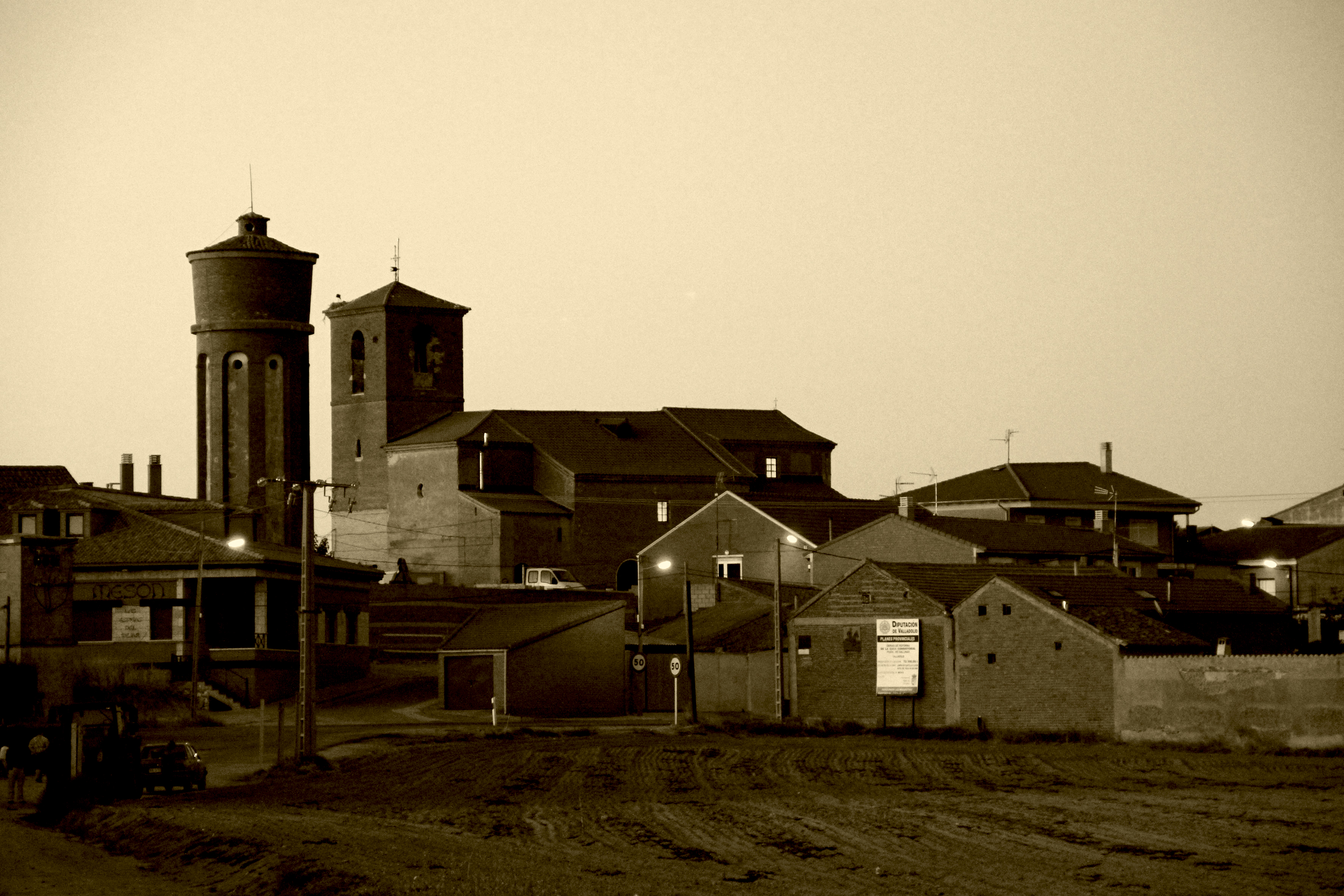 Vista de Pozal de Gallinas por Jose Maria Rodriguez Martin, "Chefo"